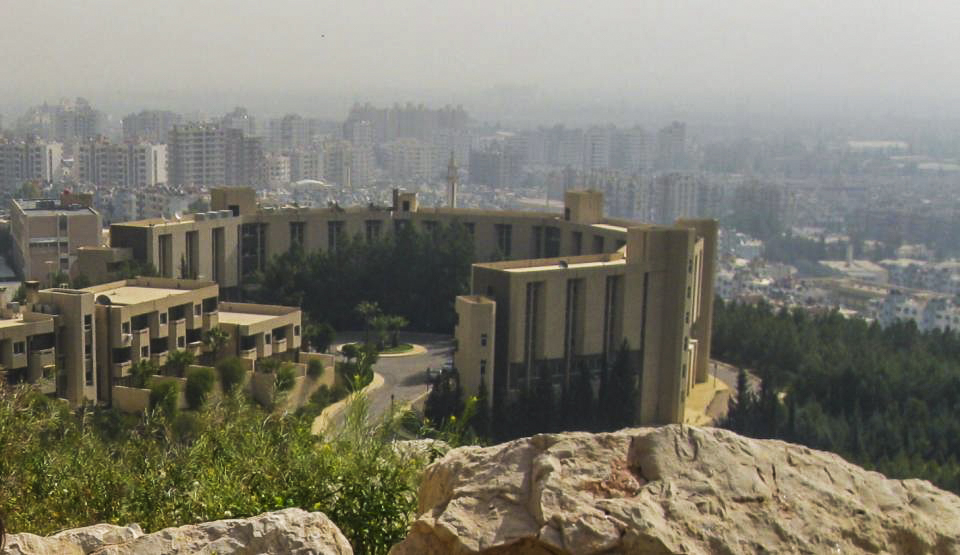 Barzéh from Mount Qasium